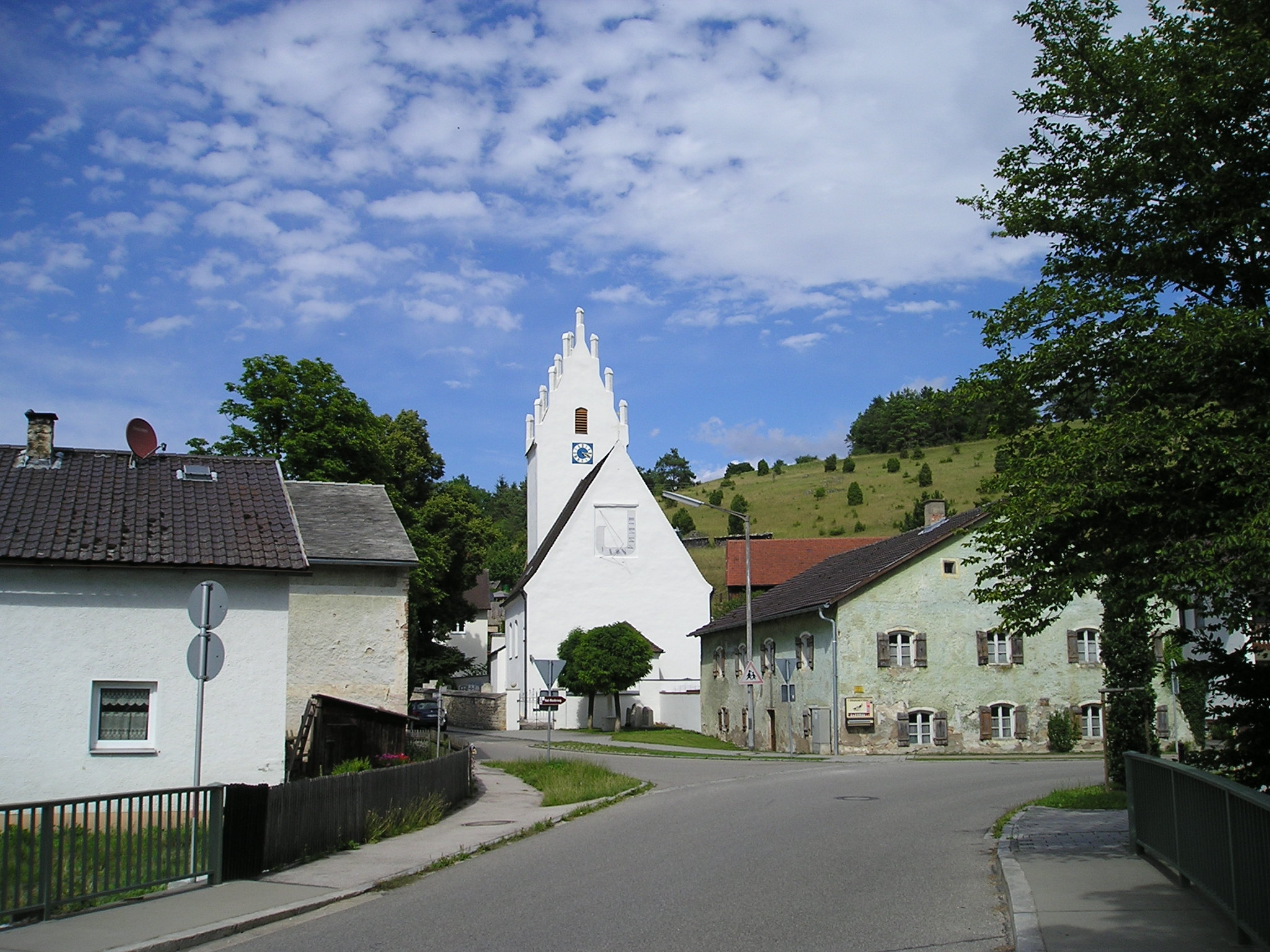 Pfünz_im_Landkreis_Eichstätt.jpg